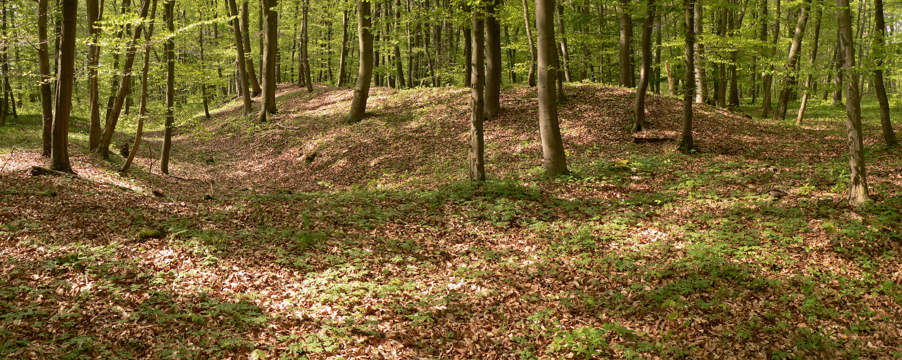 Schalksburg im Oderwald, links Graben, Mitte Wall und rechts Walllücke mit Erdbrücke)